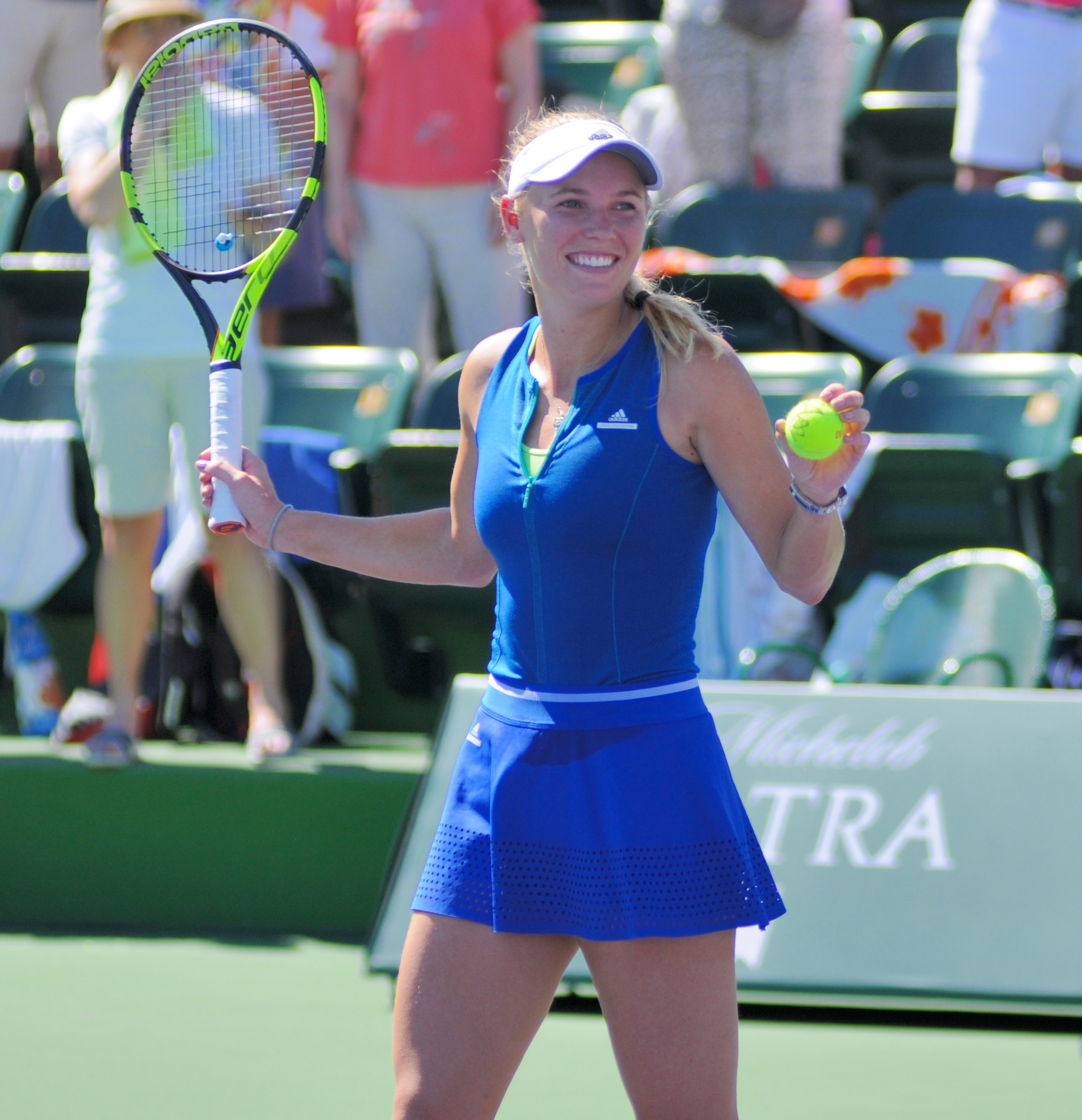 2017 BNP Paribas Open